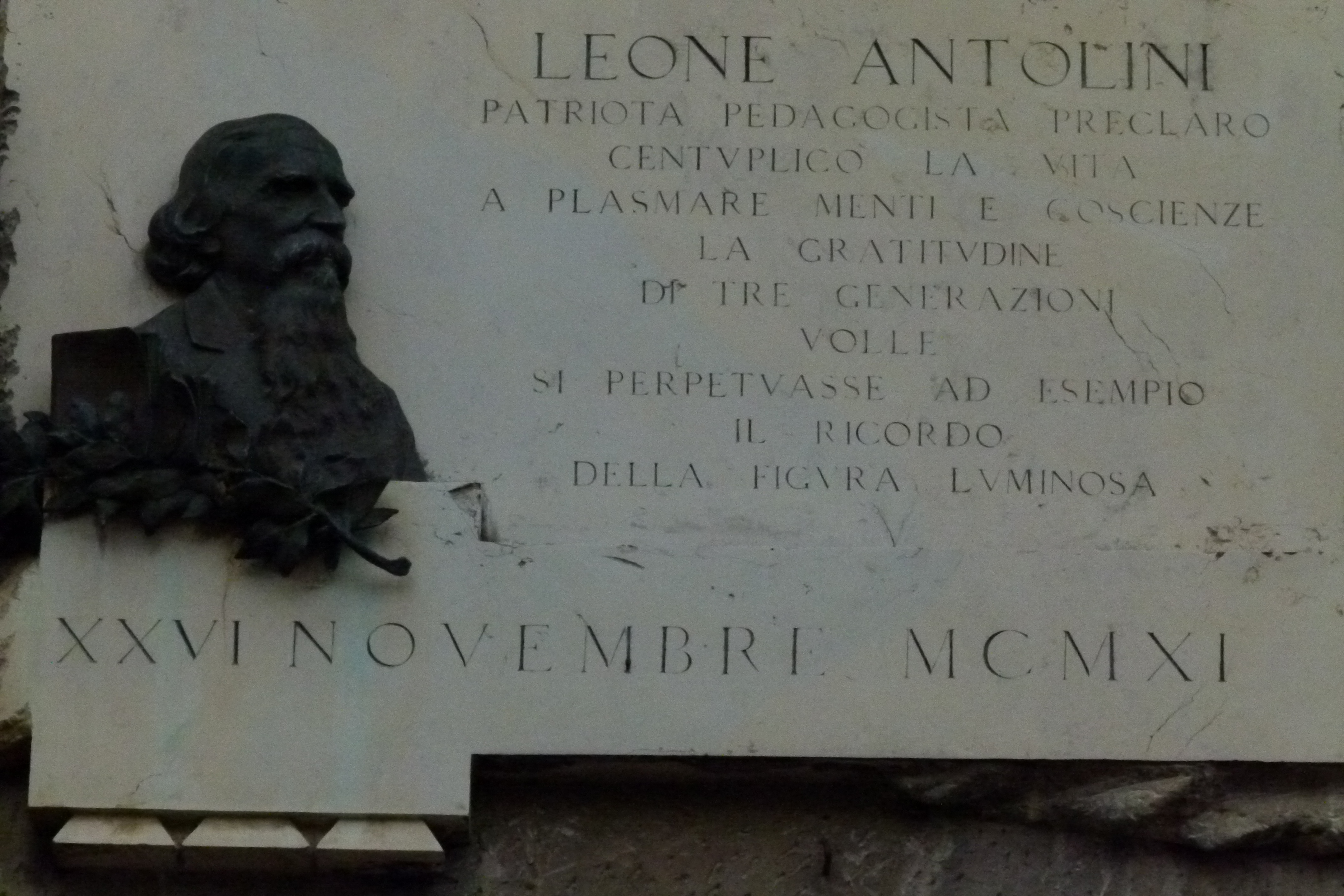 This photo was taken with Panasonic Lumix DMC-FZ100 camera, thanks to Panasonic. You can see all photographs in category: Taken with Panasonic Lumix DMC-FZ100.